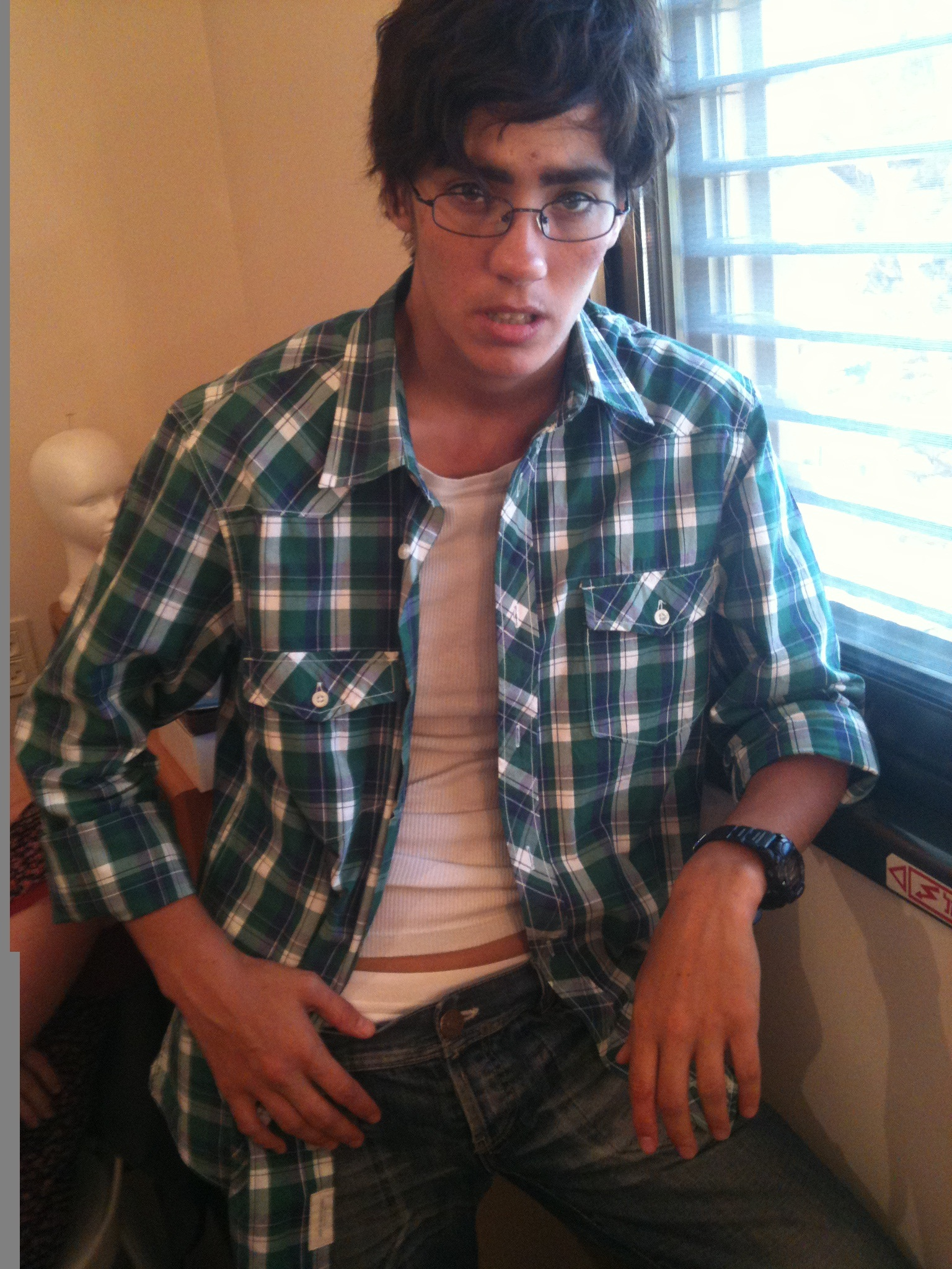 חן יאני מתוך סרטו של דורון ערן נמס בגשם